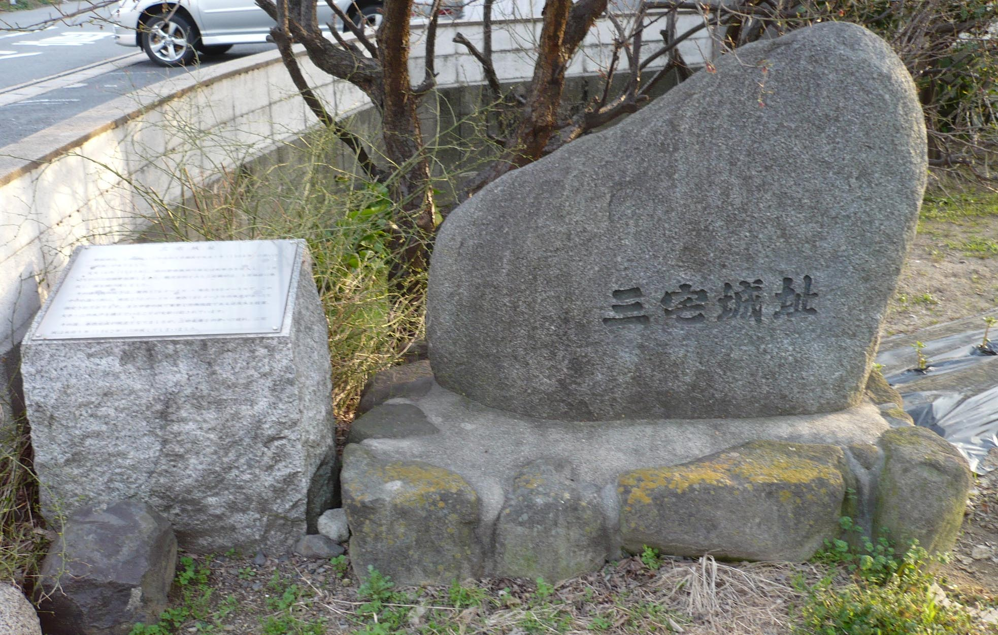 三宅城の石碑と案内板